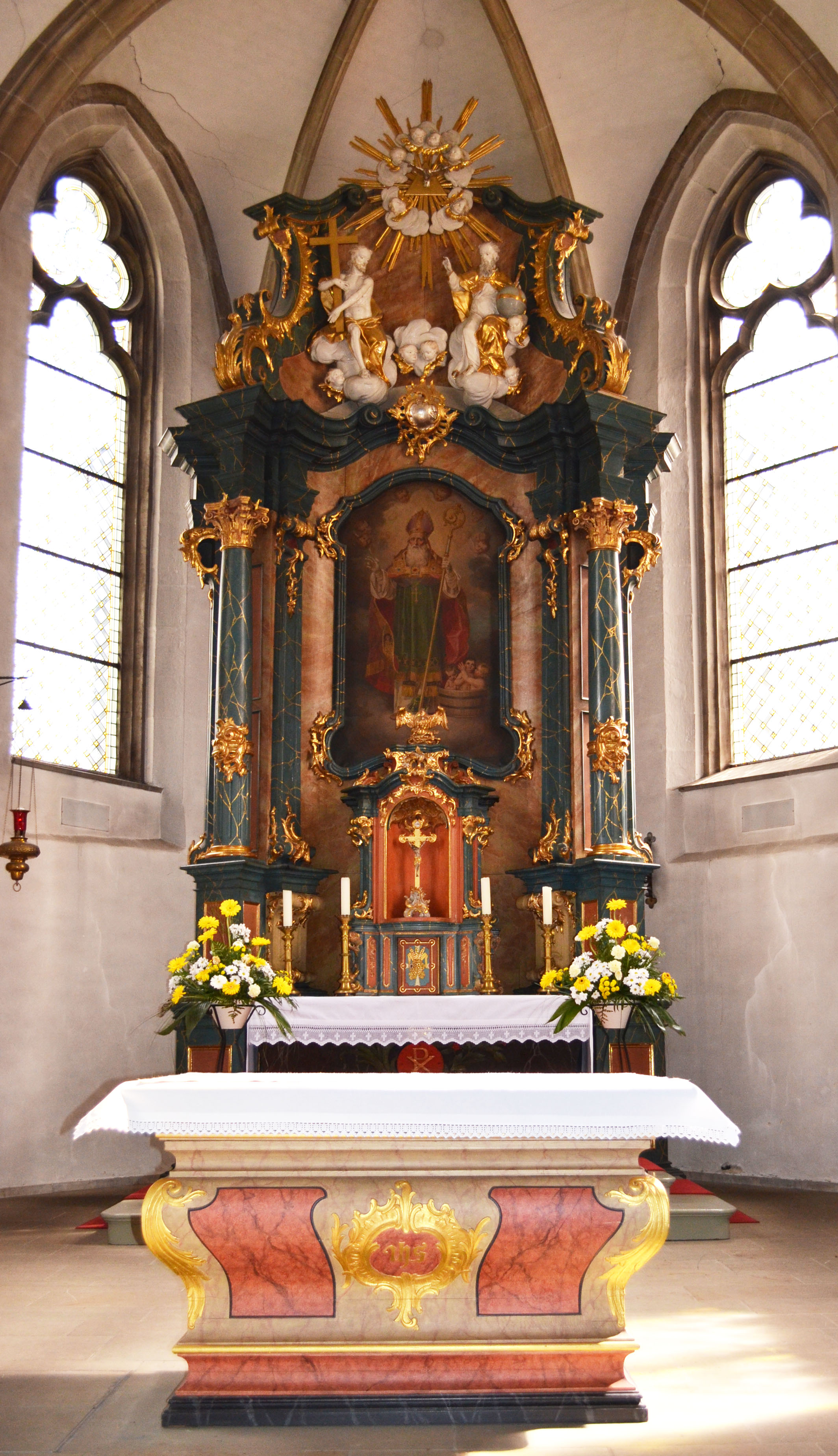 Rüthen Nikolauskirche Hauptaltar